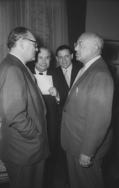 ADN-ZB /Quasch. 24.3.1955 5 Jahre Akademie der Künste der DDR in Berlin Zum 5. Jahrestag des Bestehens der Akademie der Künste in der DDR am 24.3.1955 fand eine Plenartagung und ein Empfang im Hause der Akademie statt. U.B.z.: Gespächsgruppe: v.l.n.r: Der Komponist und Musikwissenschaftler Wagner-Regeny, Intendant Fritz Wisten, Filmregisseur Slatan Dudow und Minister Dr. h.c. J. Becher.